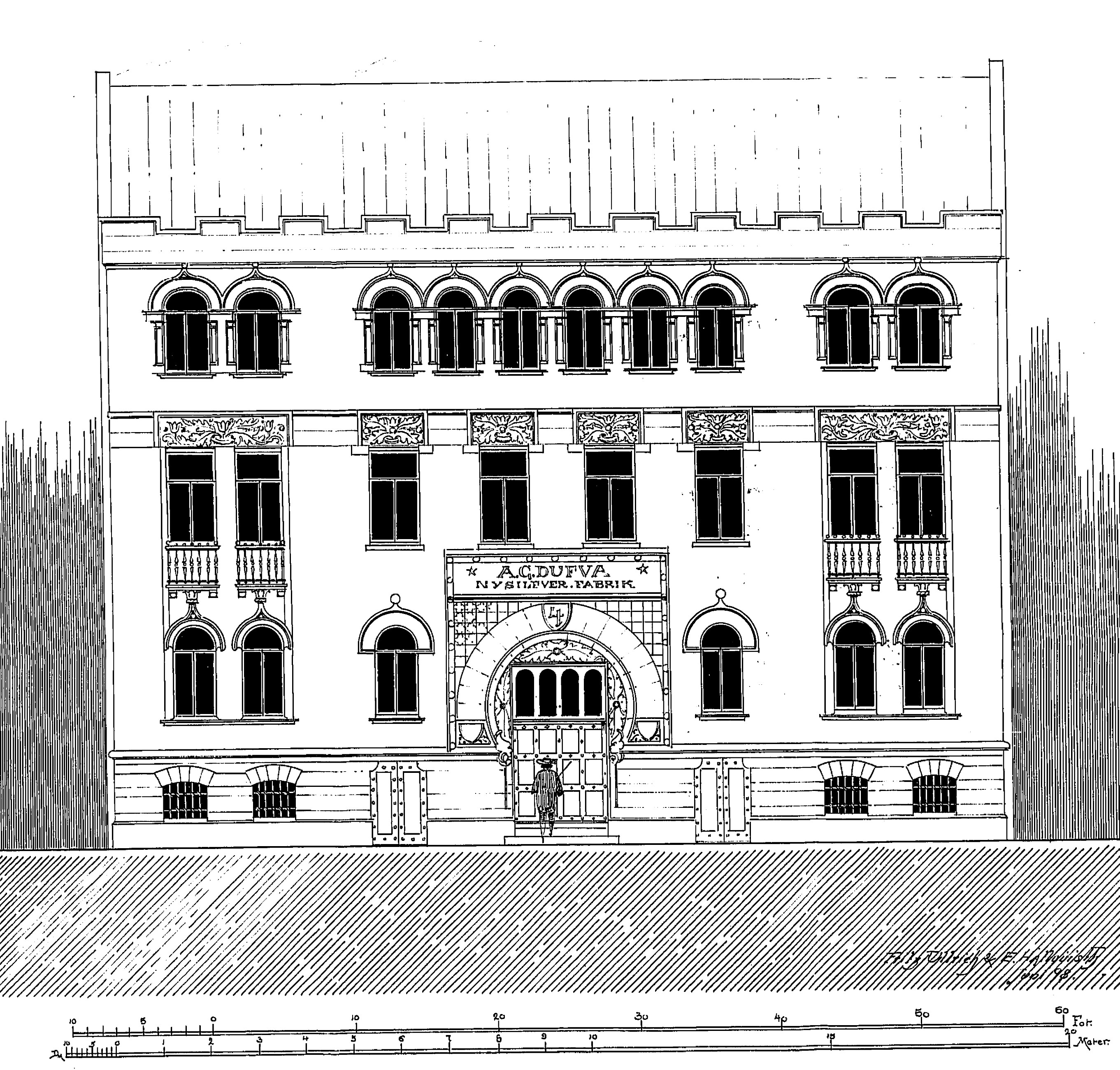 Fabriks- och kontorshus för A.G. Dufvas nysilverfabrik